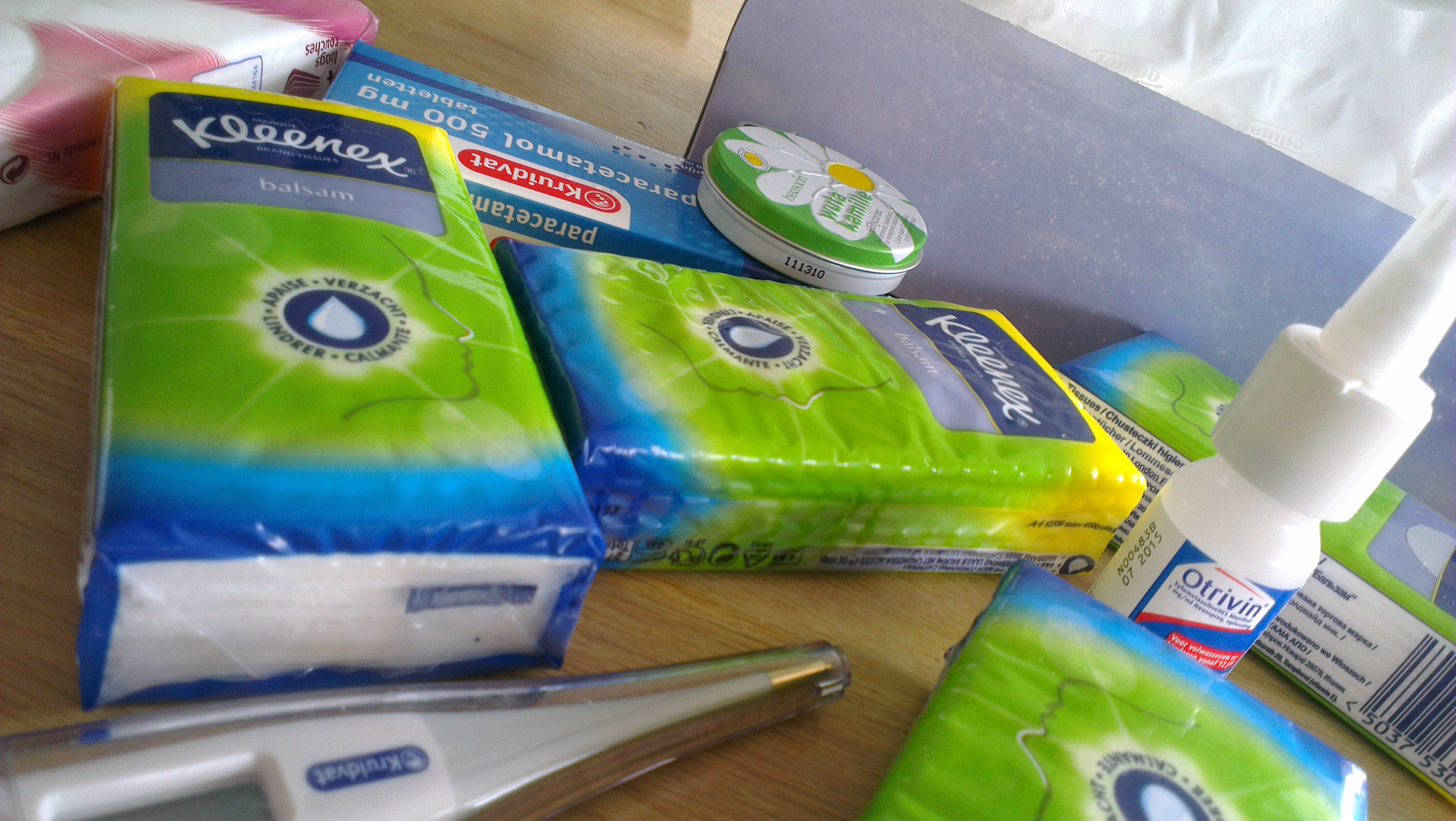 Zakdoekjes, neusspray en een thermometer.